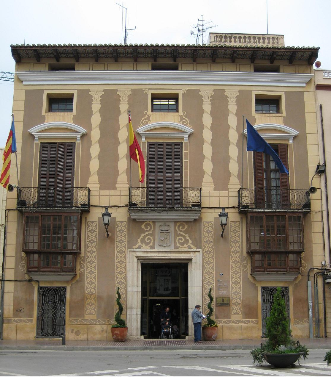 Casa de la Baronesa, sede del Ayuntamiento de Benicarló (Castellón, España)